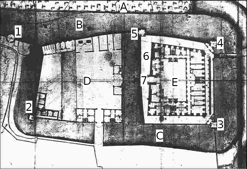 Grundriss des Deidesheimer Schlosses. Legende nach Berthold Schnabel aus: Die Geschichte der Schlossgräben, Heimatblätter Deidesheim und Umgebung, Nr. 13, 1974